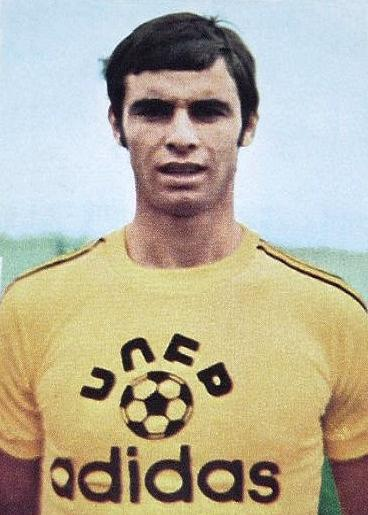 Paul Marchioni en 1974, 'Ageducatifs 1974 - 1975', Panini figurine n°176.